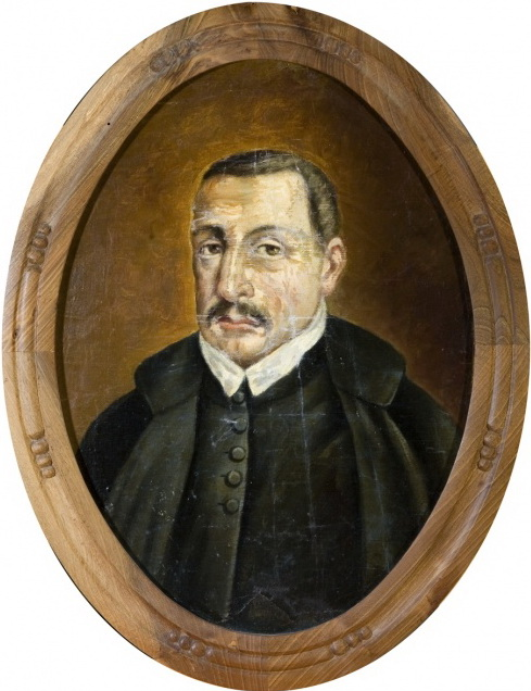 Retrato de Lupercio Leonardo de Argensola (1559-1613). Expuesto en la Biblioteca Municipal «Hermanos Argensola», situada en el Palacio de los Hermanos Argensola de Barbastro. Óleo sobre lienzo propiedad del Ayuntamiento de dicha localidad.